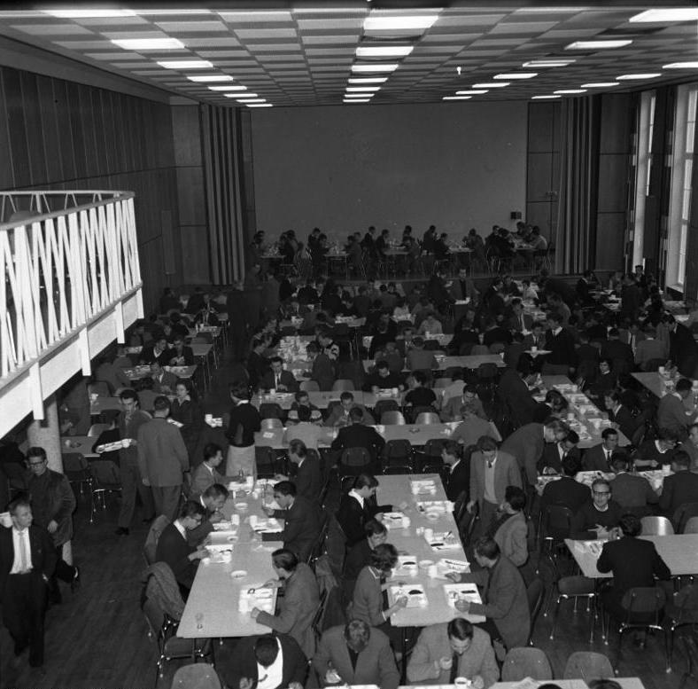 Universität Bonn, "Mensa"